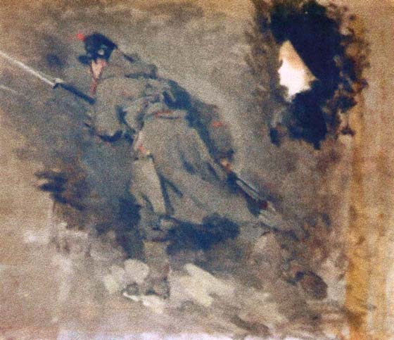 Studiu pentru Atacul de la Smârdan, Ulei pe pânză, nr. inv. 1990 - Muzeul de Artă - CONSTANŢA. Este o schiță în ulei, realizată chiar pe front. În ea se observă, în prim-plan, soldatul român care aleargă cu baioneta în mână, iar într-un colț se află un portret de femeie.